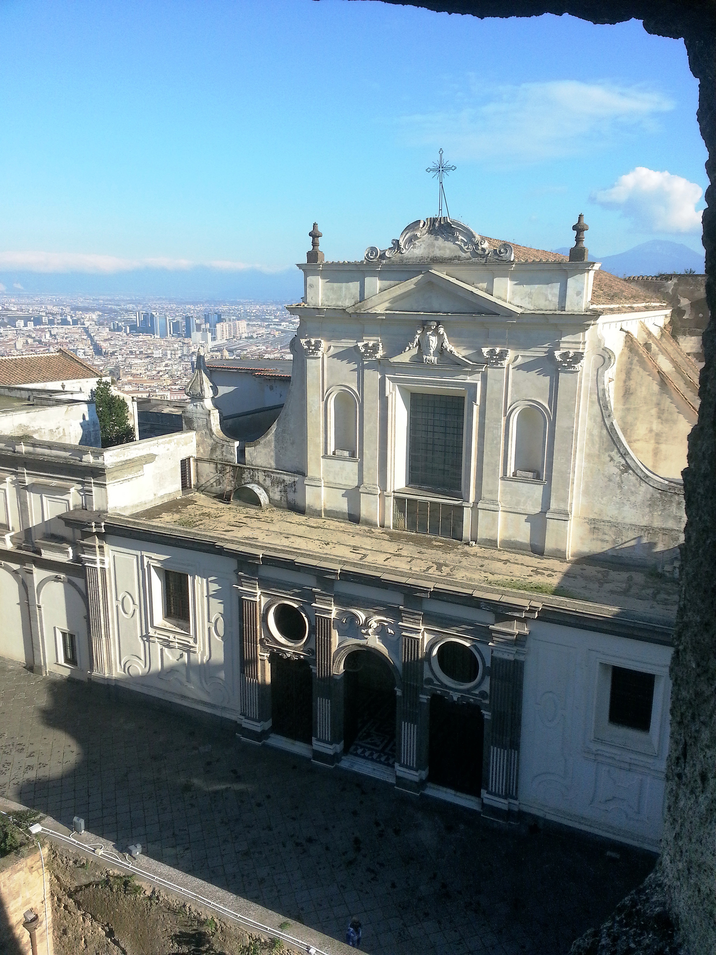 Facciata della Chiesa della Certosa